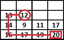 Srpskohrvatski / српскохрватски: Algoritam